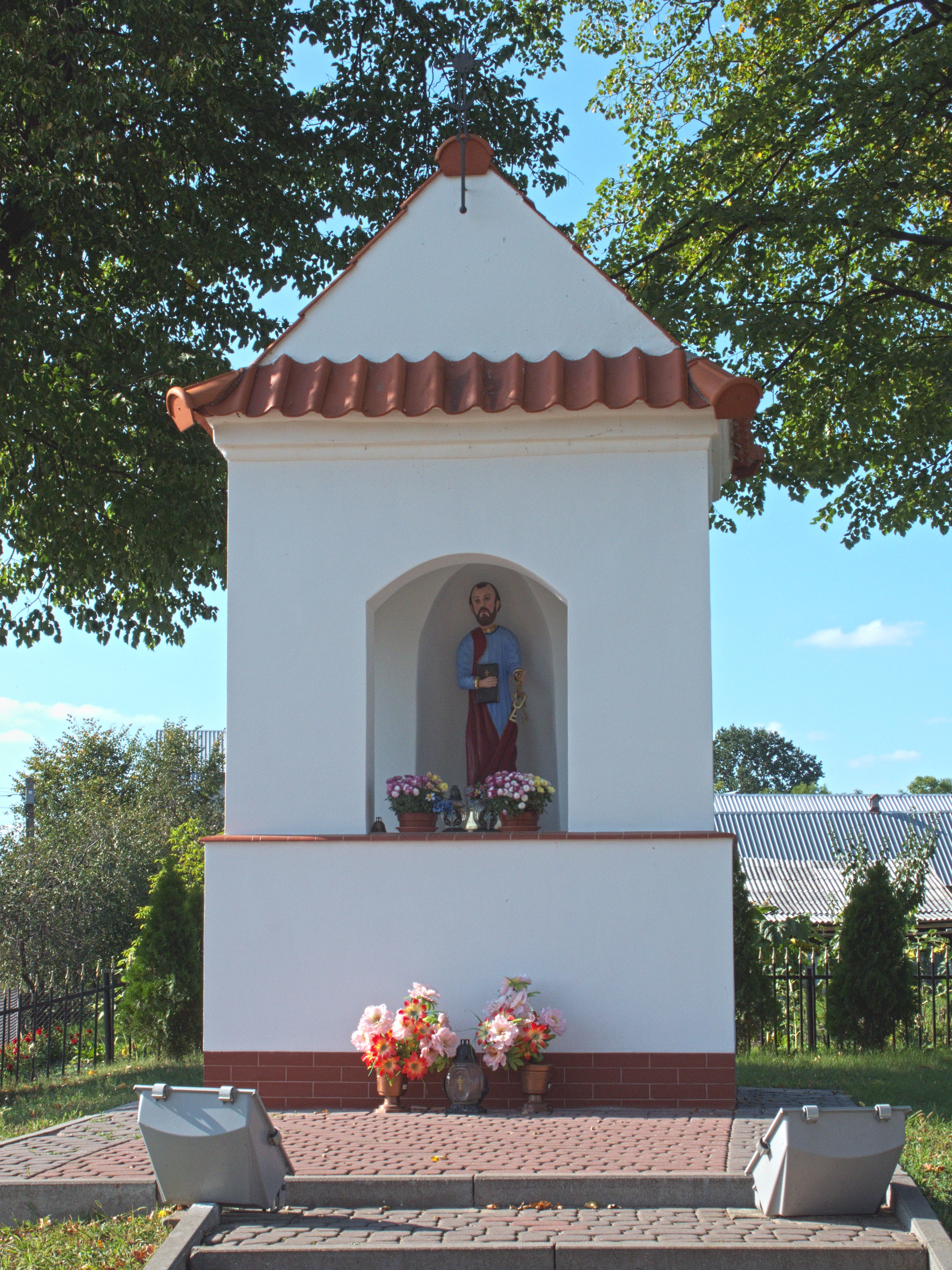 Murowana kapliczka z figurą św. Piotra z XIX położona u zbiegu ulic Binduga i Kilińskiego w Brańsku.